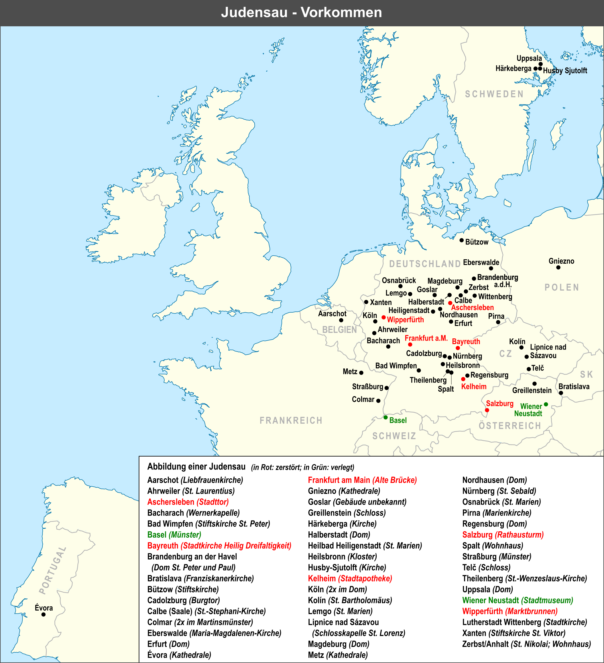 Architektonische Nachweise der Judensau